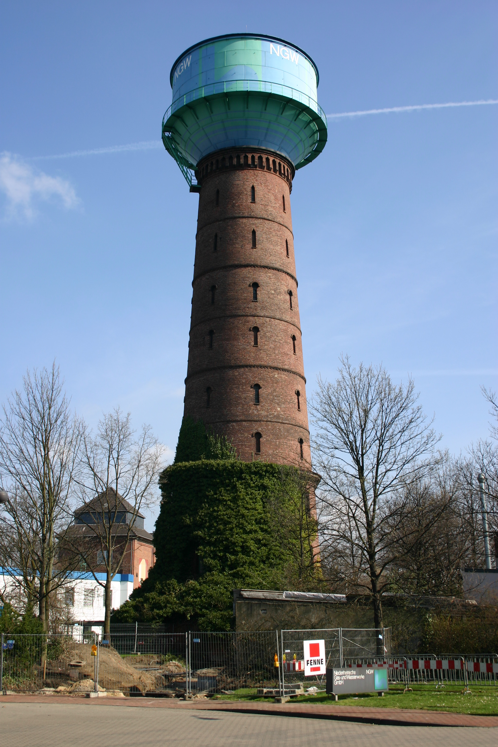 Wasserturm auf der Alleestraße in Hamborn:Duisburg-Hamborn / Nordrhein-Westfalen